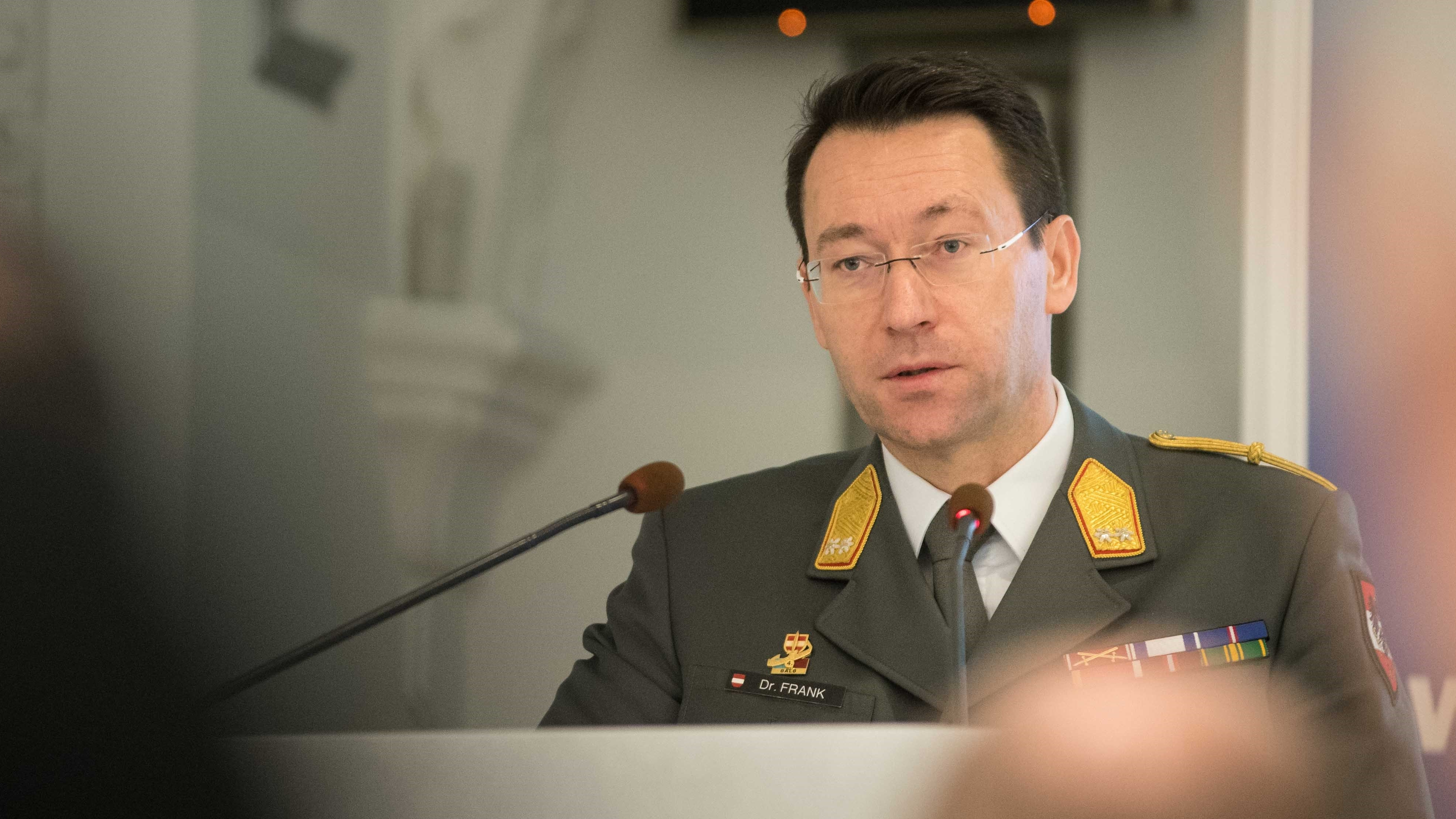 Johann Frank